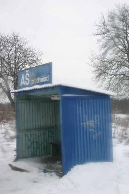 Bahnhof Aš předměstí